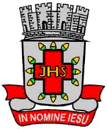 Imagem do brasão da cidade de Santo Antônio de Jesus, Bahia, Brasil.